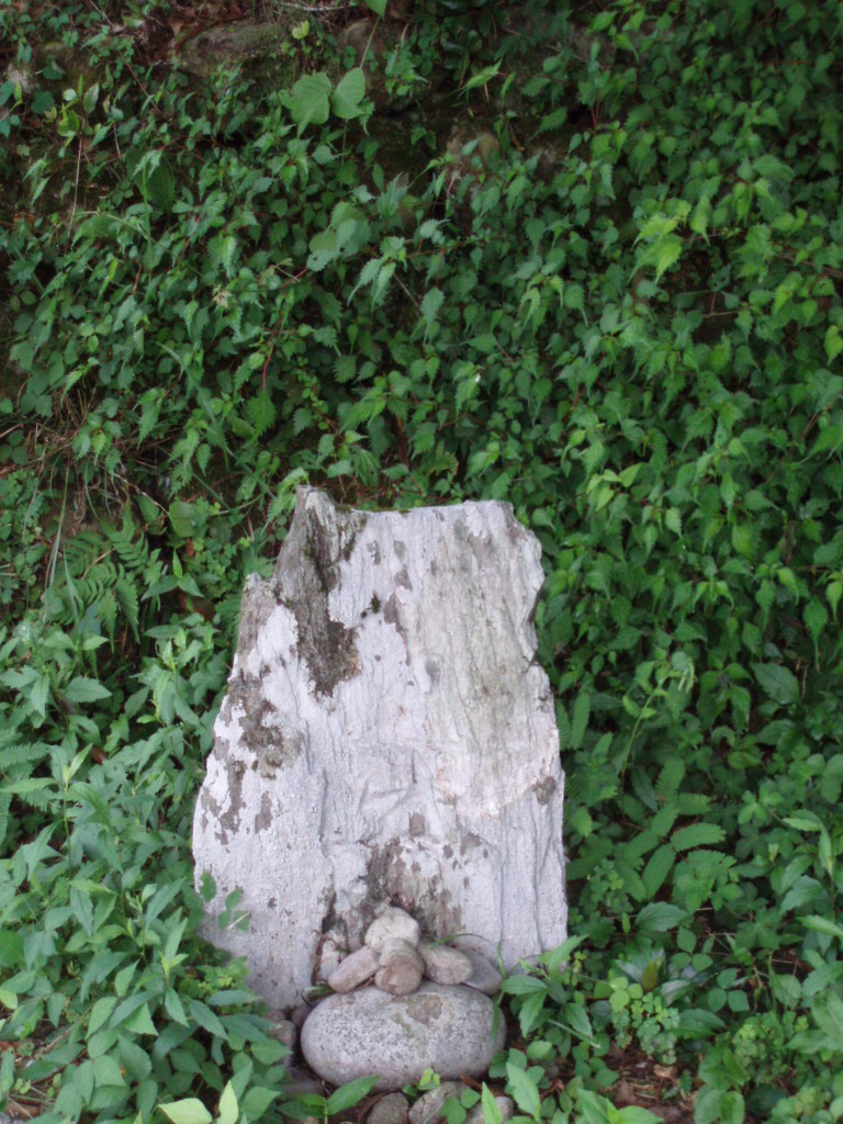 Monument_KOBIRO-oji_remains